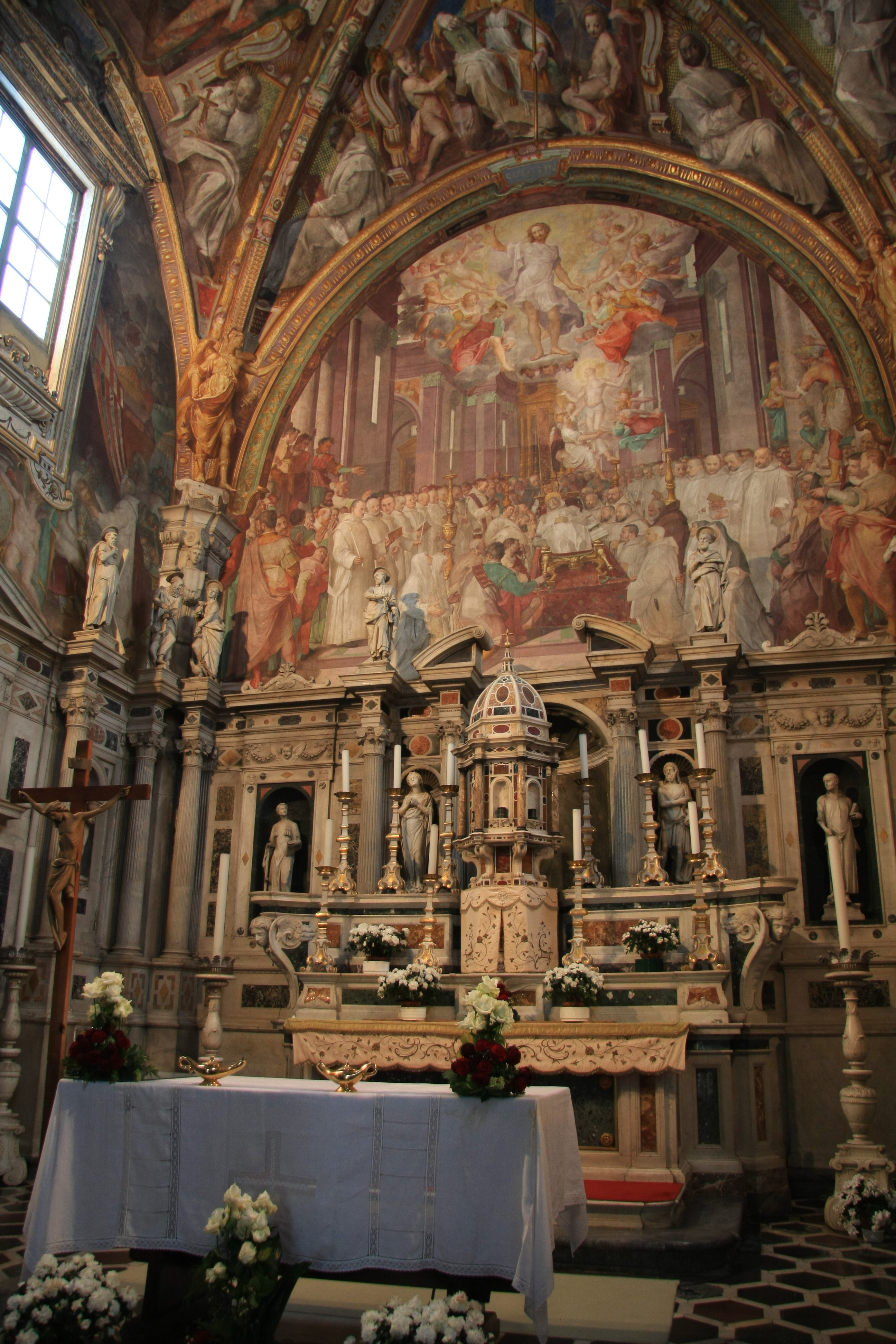 Certosa del Galluzzo - Altar